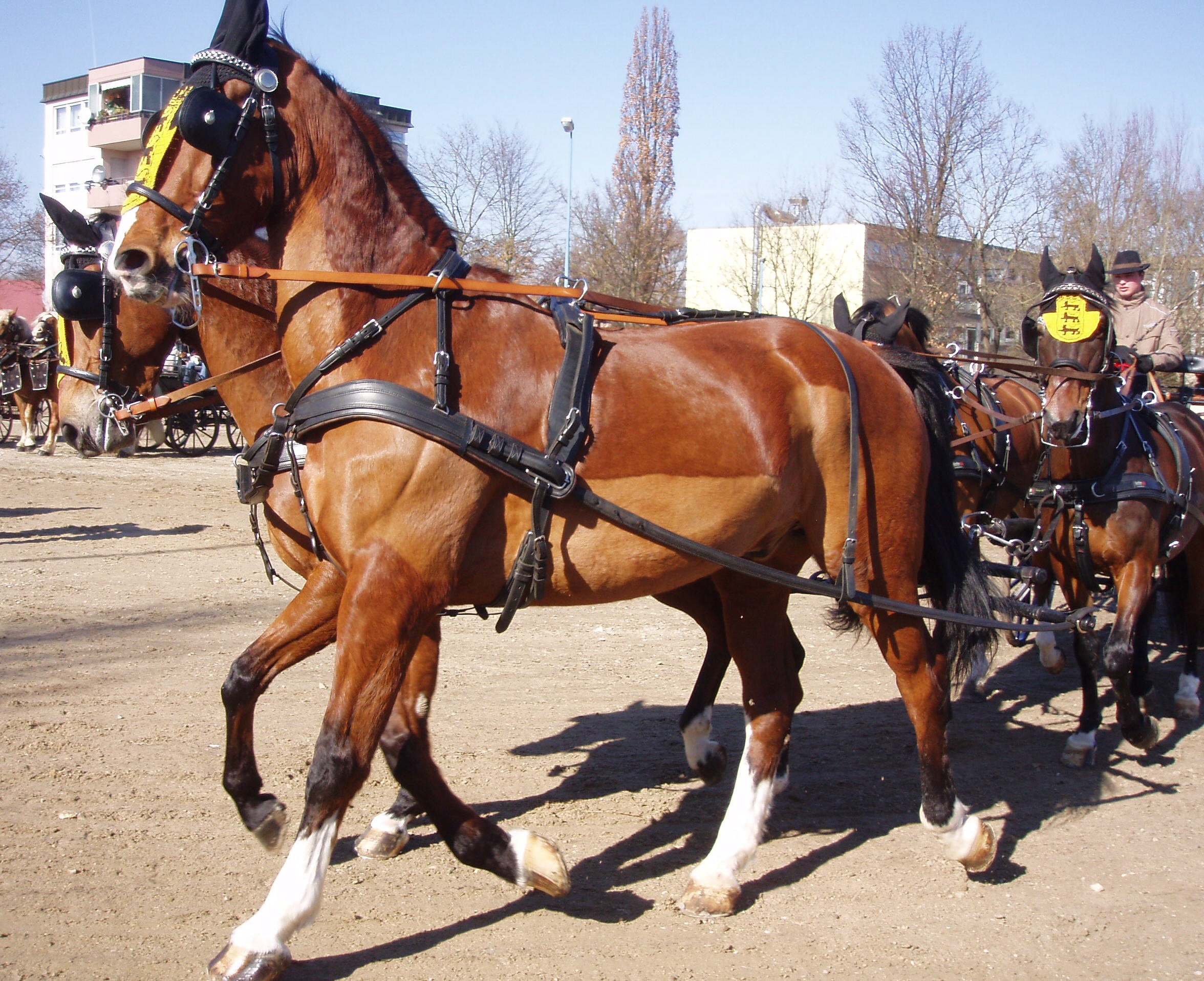 Vierspänner, vorne links ein Gelderländer